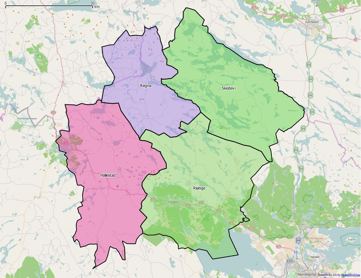 Distriktsindelningen i Finspångs kommun